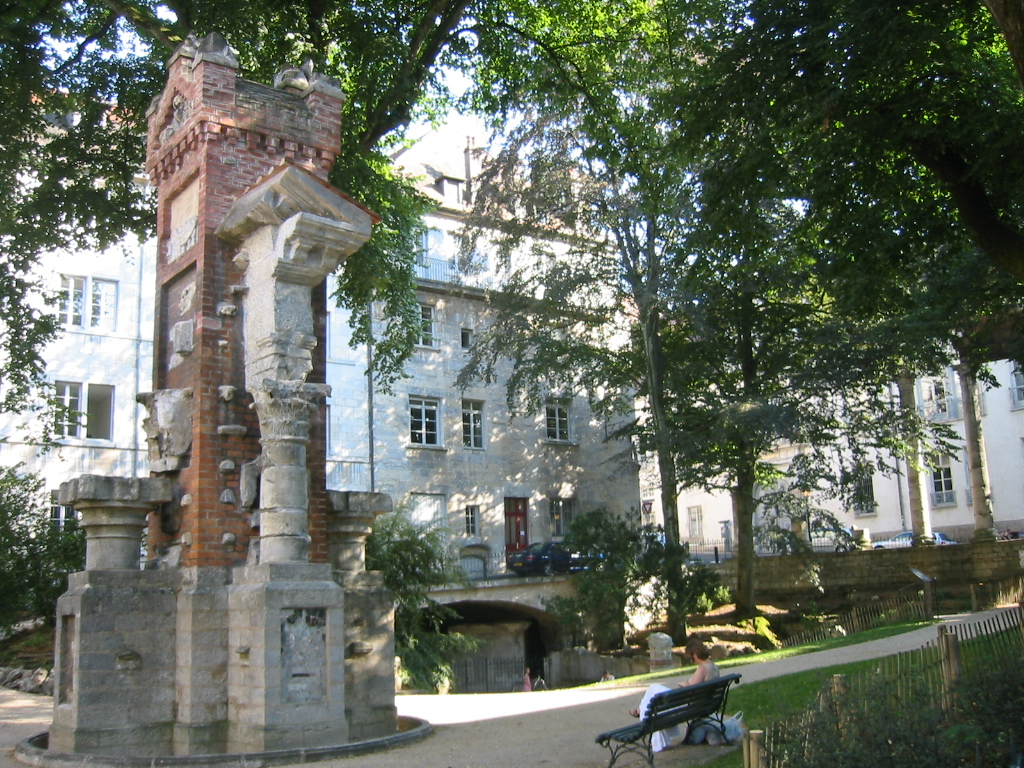 Square Castan Besancon 4